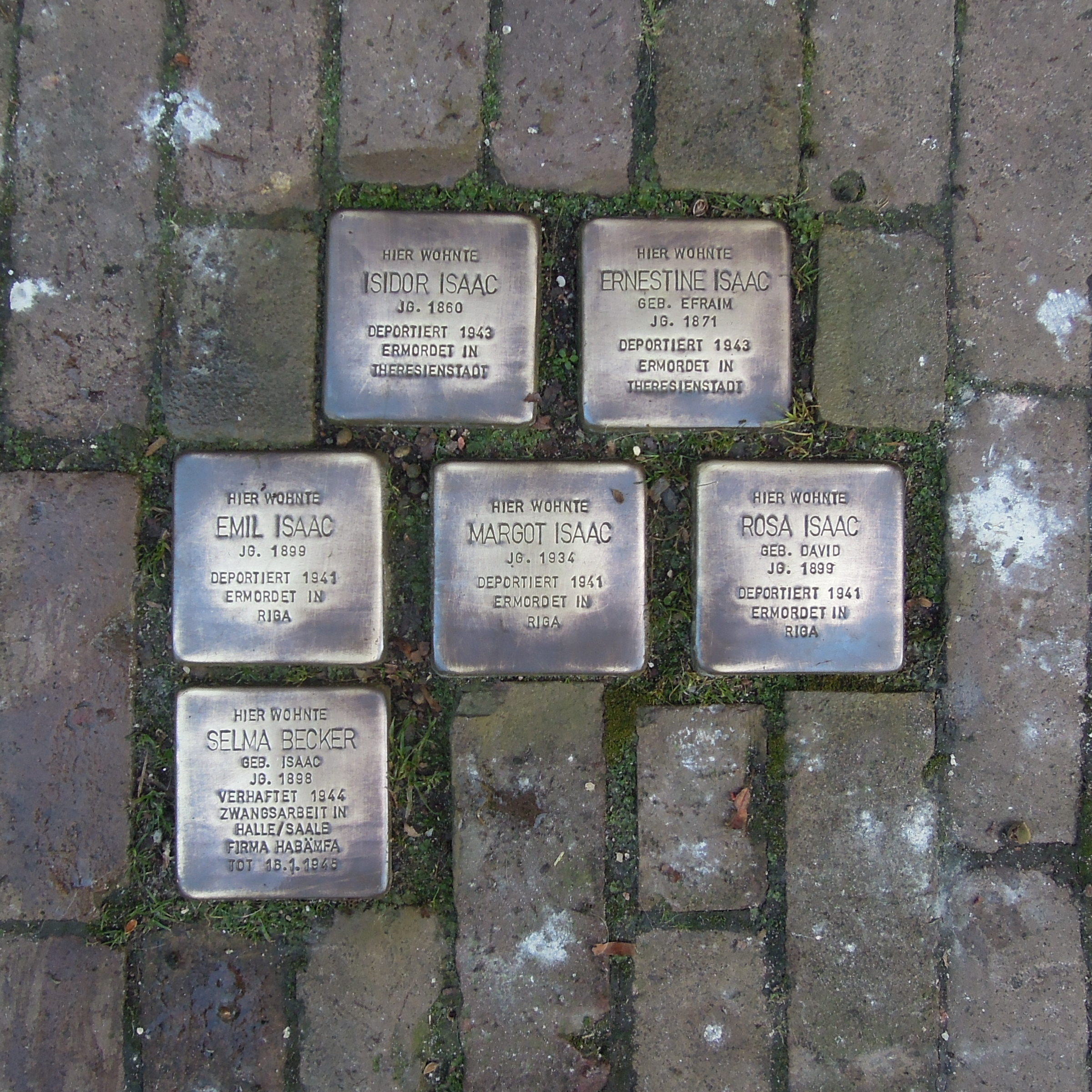 Stolpersteine Rees Kirchplatz 14